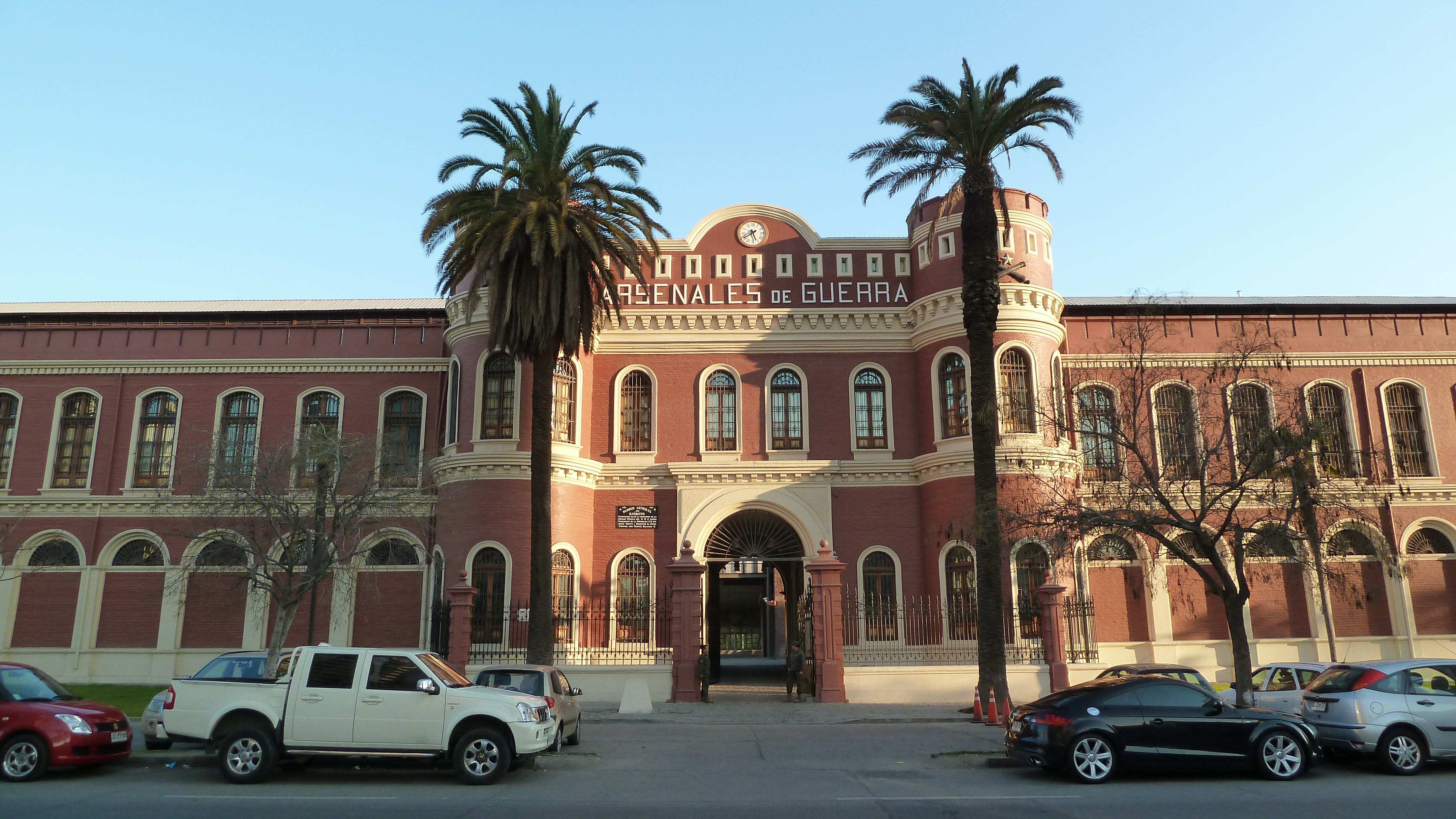 Ex Arsenales de Guerra This is a photo of a national monument in Chile: 876